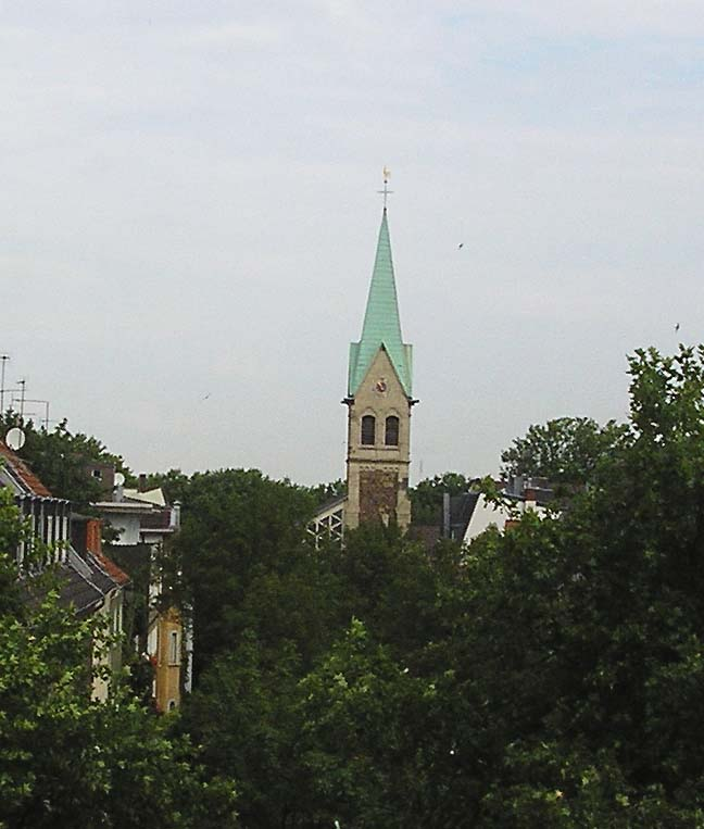 Lutherkirche, Duisburg-Duisssern